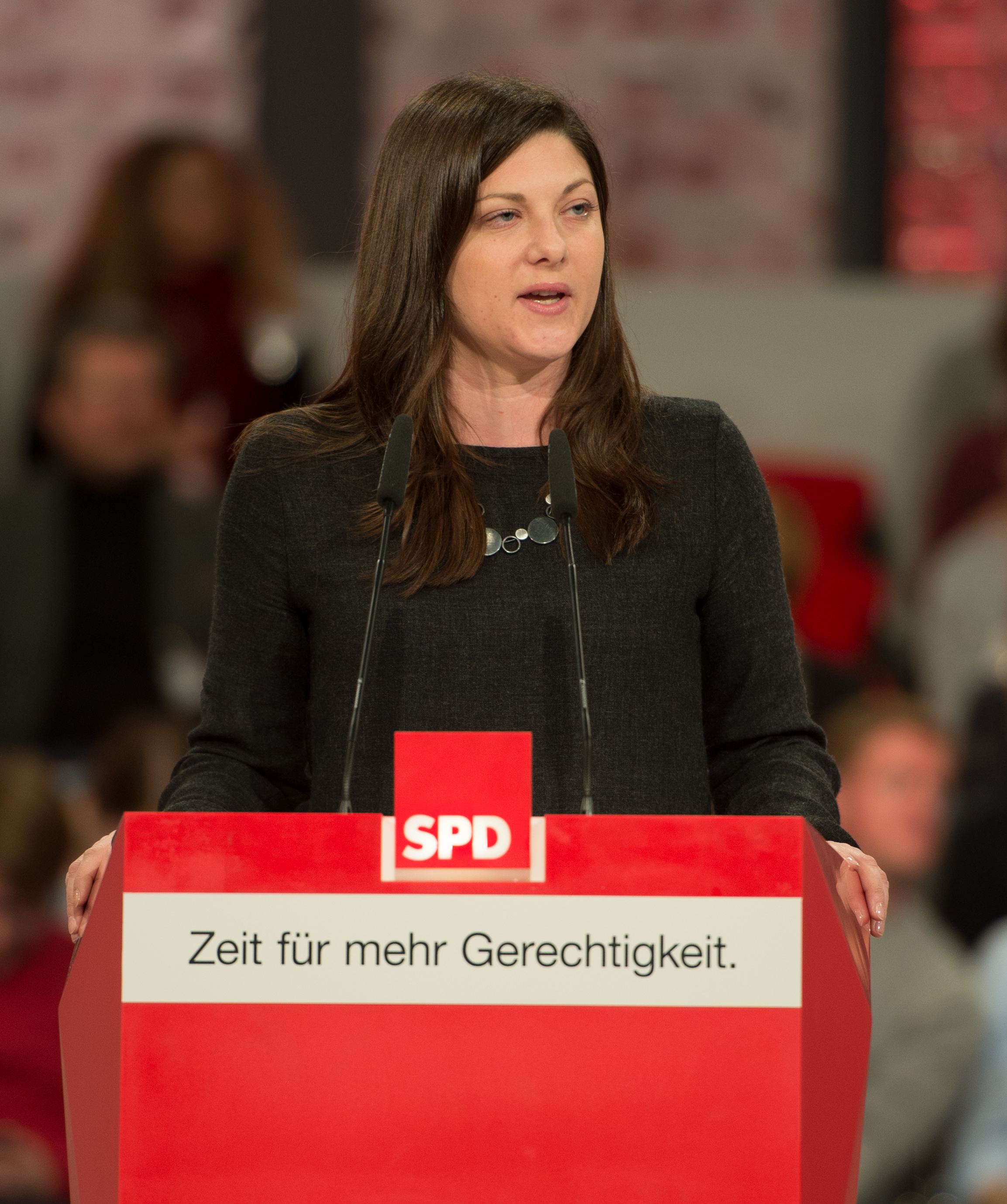 Johanna Uekermann, SPD, auf dem SPD Bundesparteitag am 19. März 2017 in Berlin